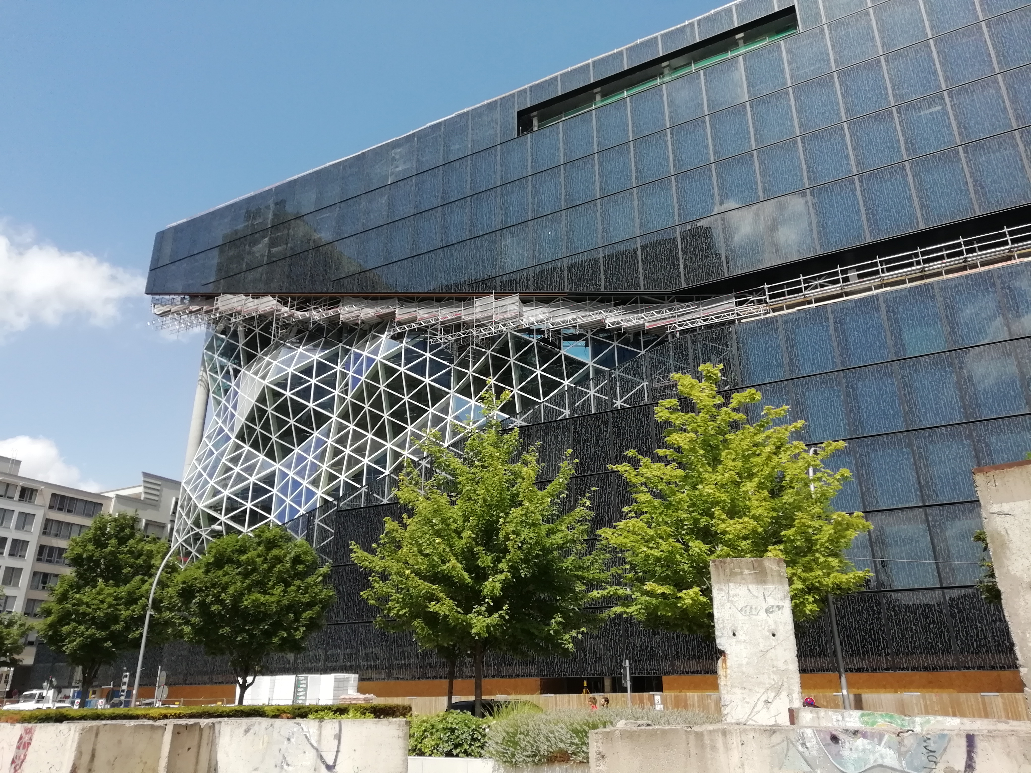 Axel-Springer-Neubau Berlin, 1. Juli 2019